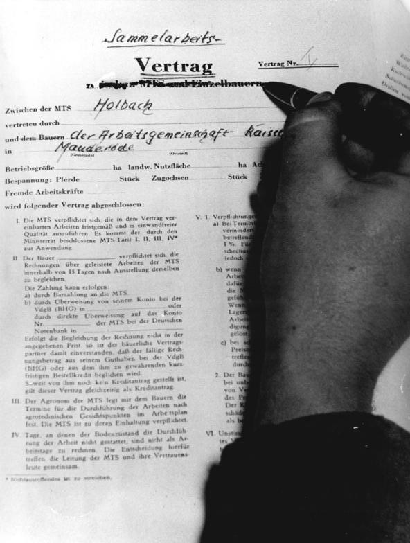 Mauderode, Vertragsabschluss Bauern und MTS Zentralbild Erfurt-Wlocka 20.2.1956 - Die ständigen Arbeitsgemeinschaften in Mauderode bereiten sich auf die Frühjahrsaussaat vor. Um die Technik besser ausnutzen, schneller, leichter und billiger zu arbeiten, haben sich 21 werktätige Einzelbauern aus Mauderode, Kr. Nordhausen, zu mehreren ständigen Arbeitsgemeinschaften zusammengeschlossen. Die Bauern der Arbeitsgemeinschaften führen zeit- und kraftraubende sowie andere Arbeiten gemeinsam aus, helfen sich gegenseitig mit Maschinen und Geräten, beraten sich untereinander, damit sie mehr ernten, höhere Einnahmen haben und demVolke mehr Lebensmittel liefern können. Jetzt vor Beginn der Frühjahrsbestellung, beraten die Bauern den Aufbauplan. UBz: Die ständigen Arbeitsgemeinschaften von Mauderode schließen mit der MTS Holbach Sammelarbeitsverträge ab.